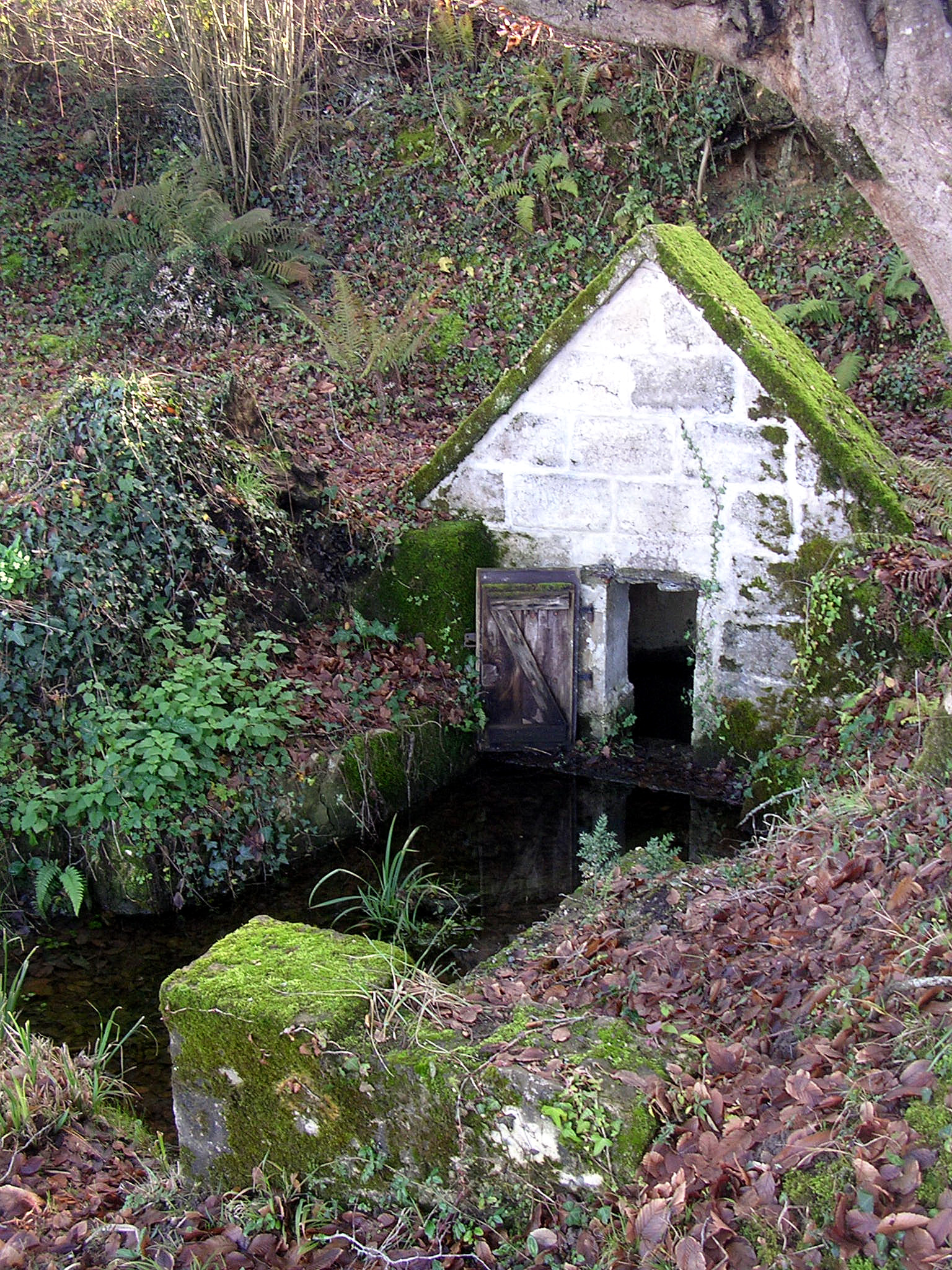 Fontaine de Mondiron, à Dumes (Landes, France)